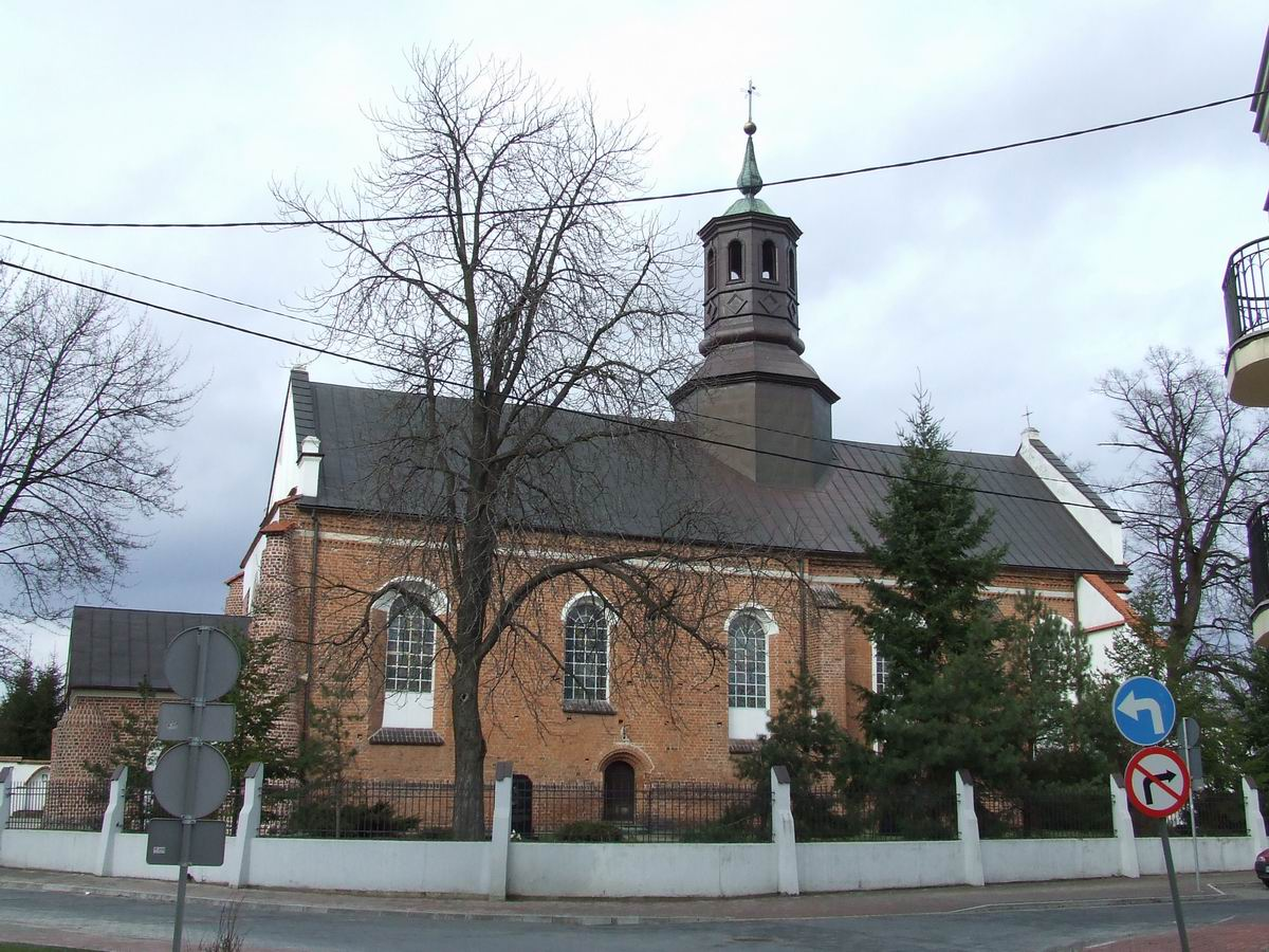 Piaseczno, kościół pw św. Anny